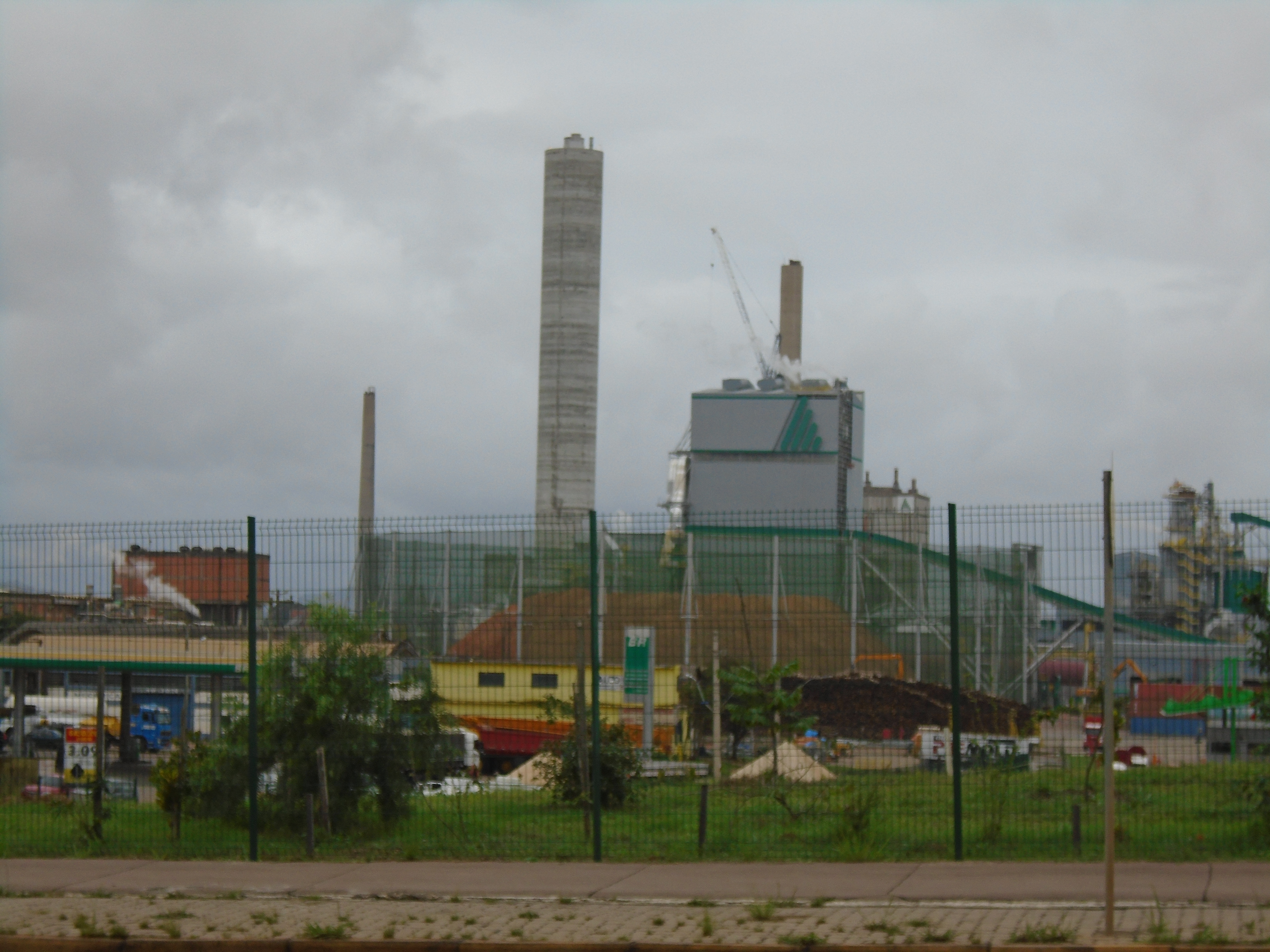 Borregaard (Guaíba, Brasil), hoje Aracruz Celulose